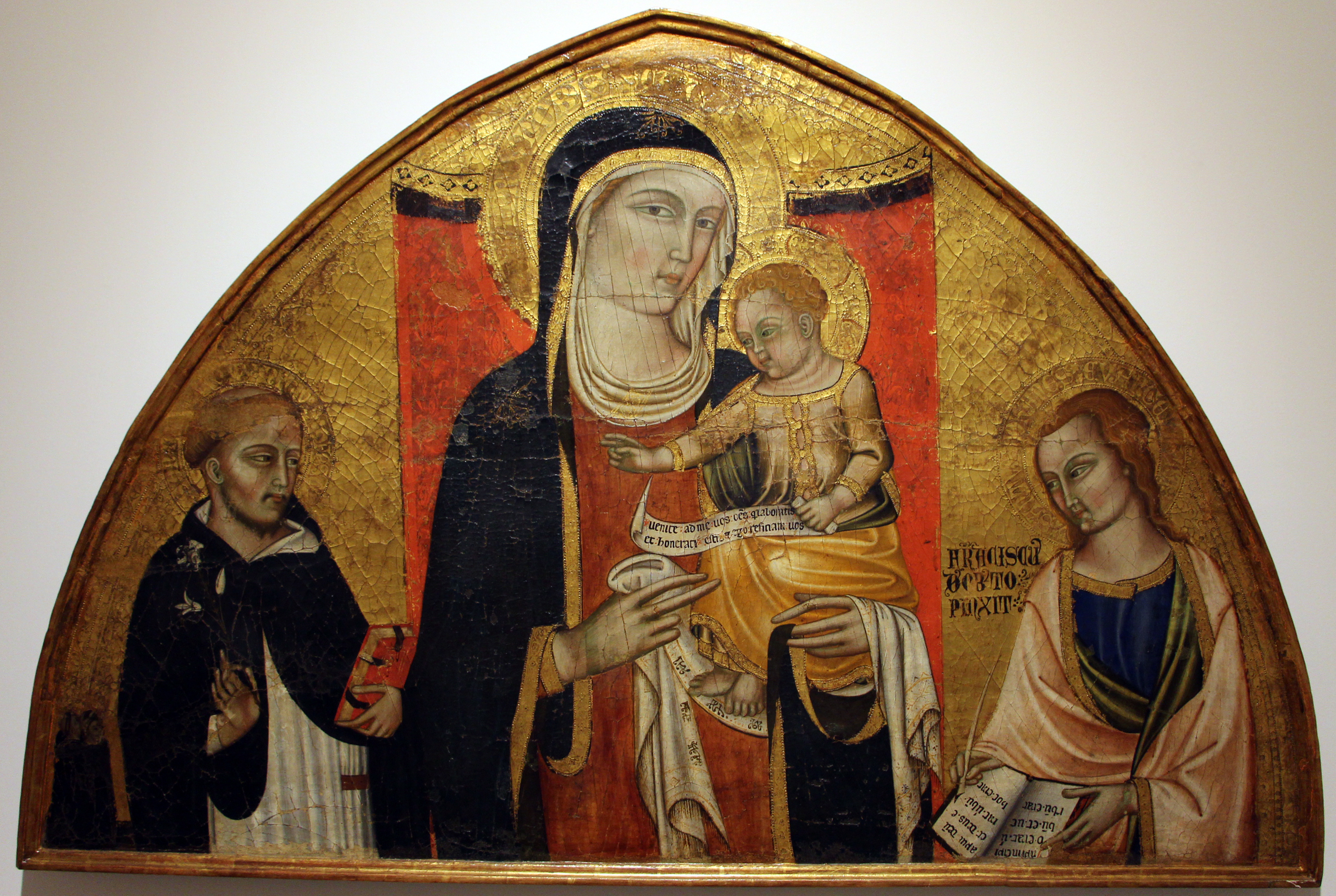 Accademia Ligustica di Belle Arti